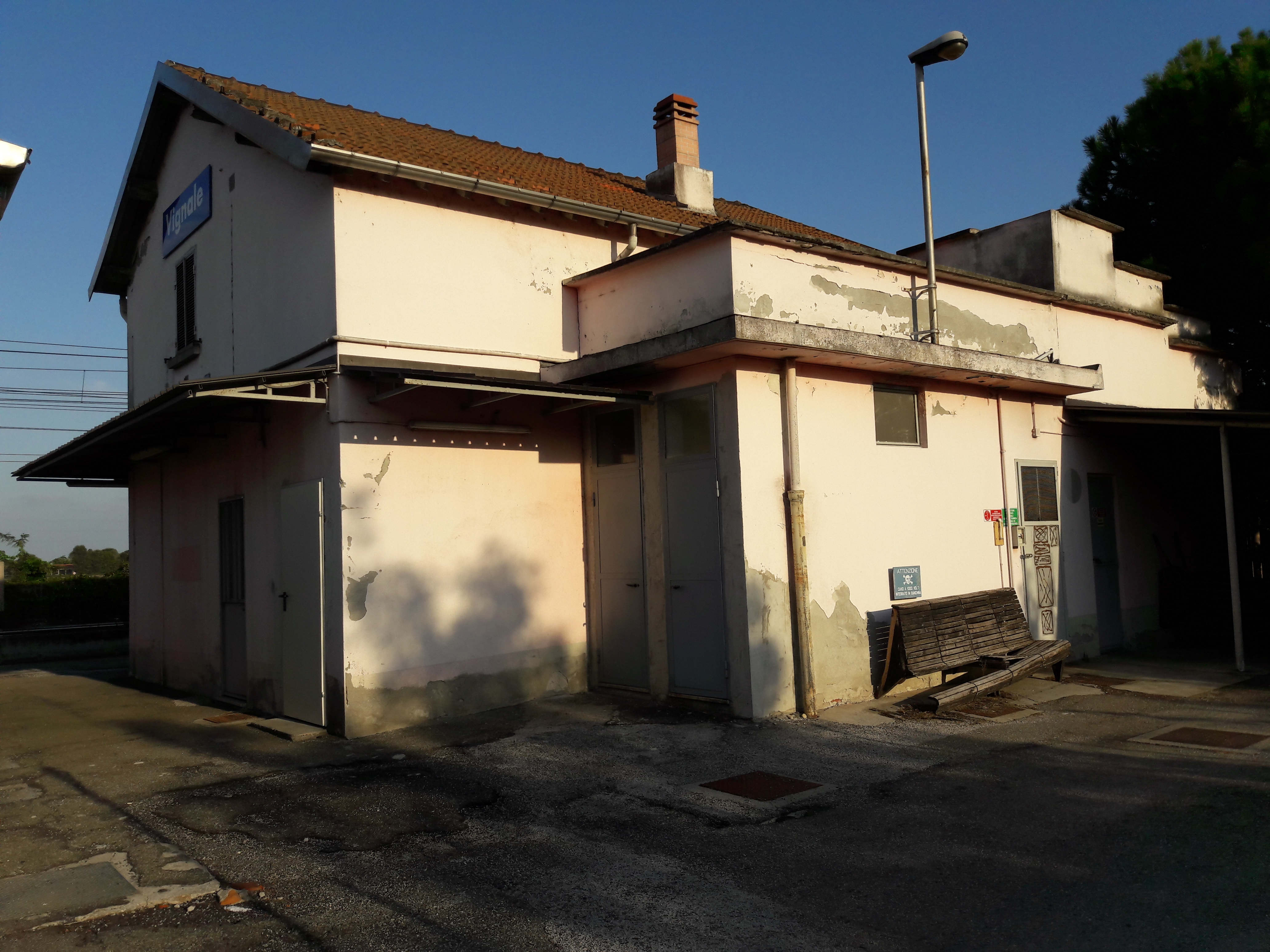 Il fabbricato viaggiatori visto dalla strada.